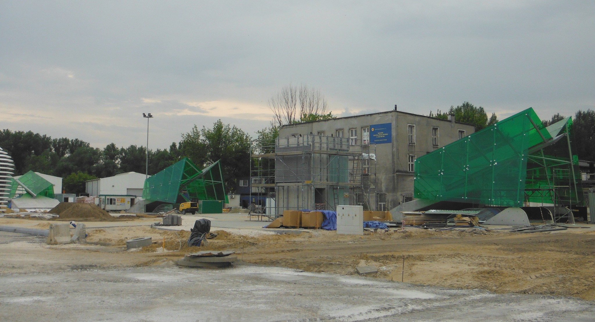 Budowa stacji "Stadion Narodowy" w Warszawie (stan z 6 lipca 2014).